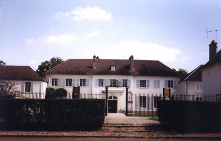 Description: Forêt de Sénart, La FaisanderieSource: Utilisateur:vinbaronLicence